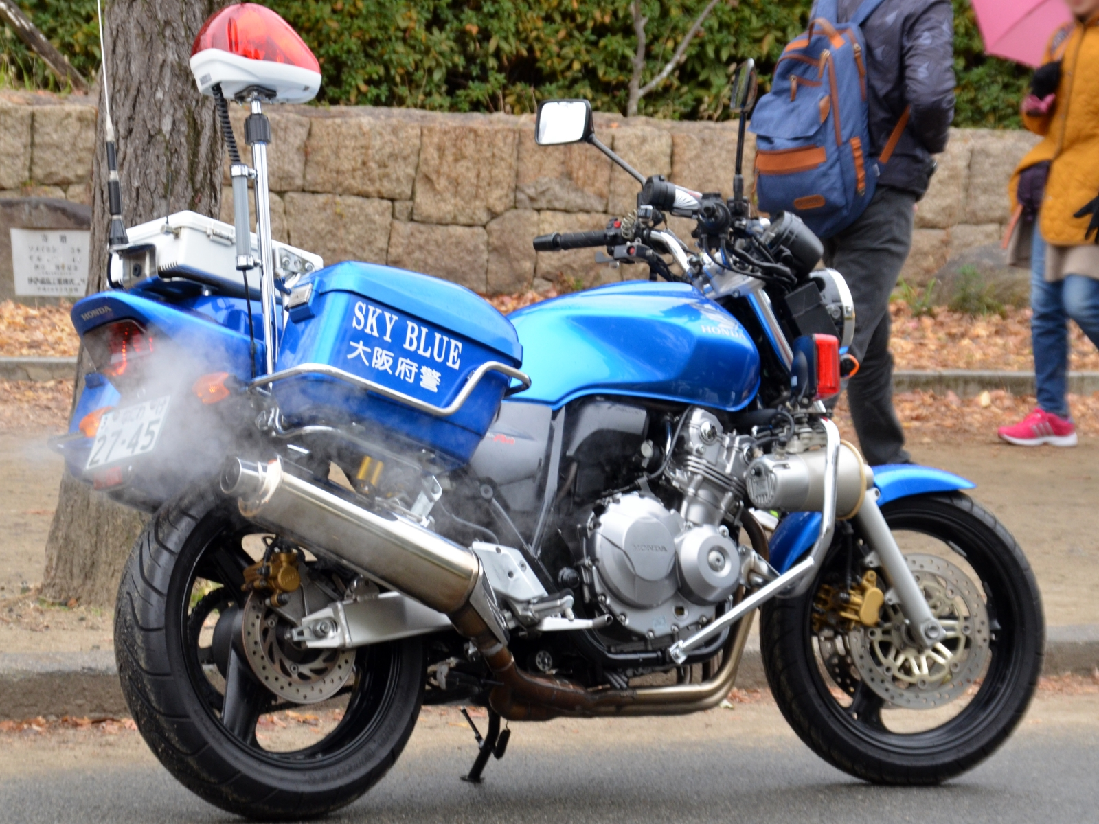 大阪府警スカイブルー隊のCB400スーパーフォア